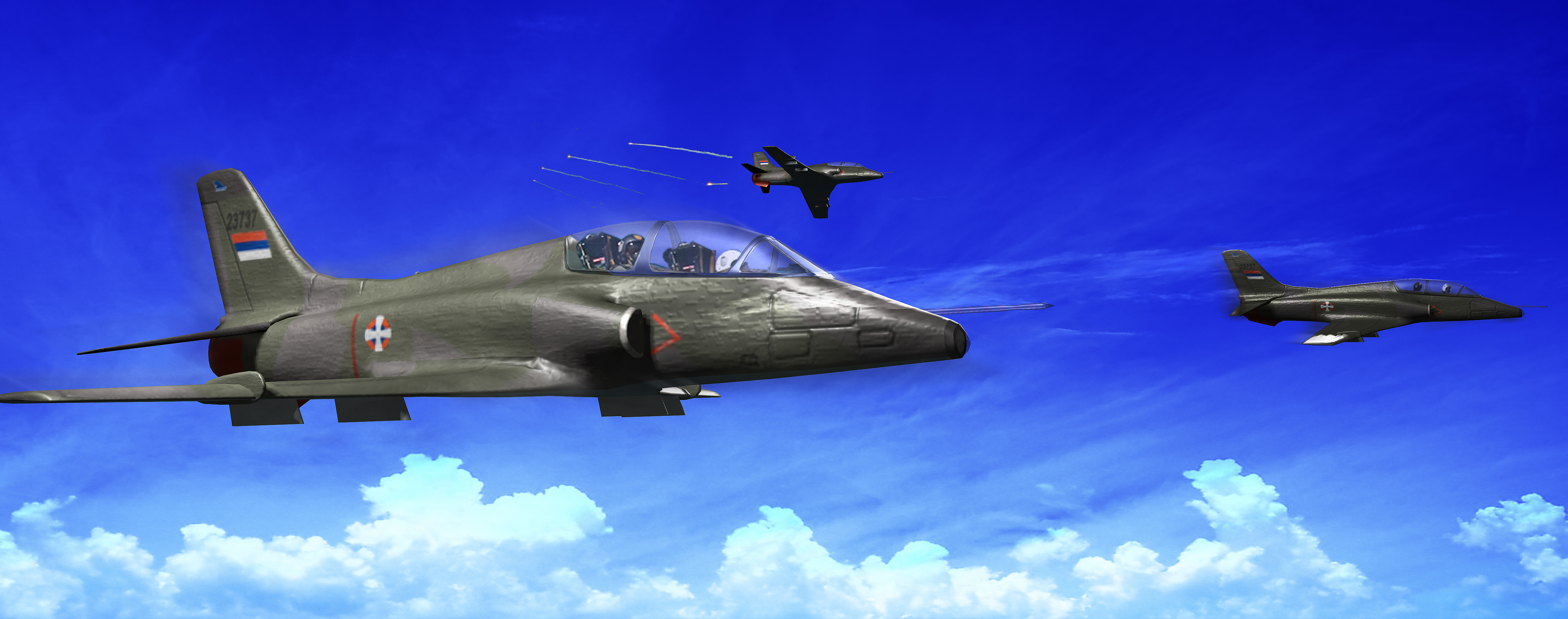 Прелет Г-4 Супергалеба изнад Шумадије. Модел и рендер рађен у Маји, текстуре и пост-продукција у Фотошопу.